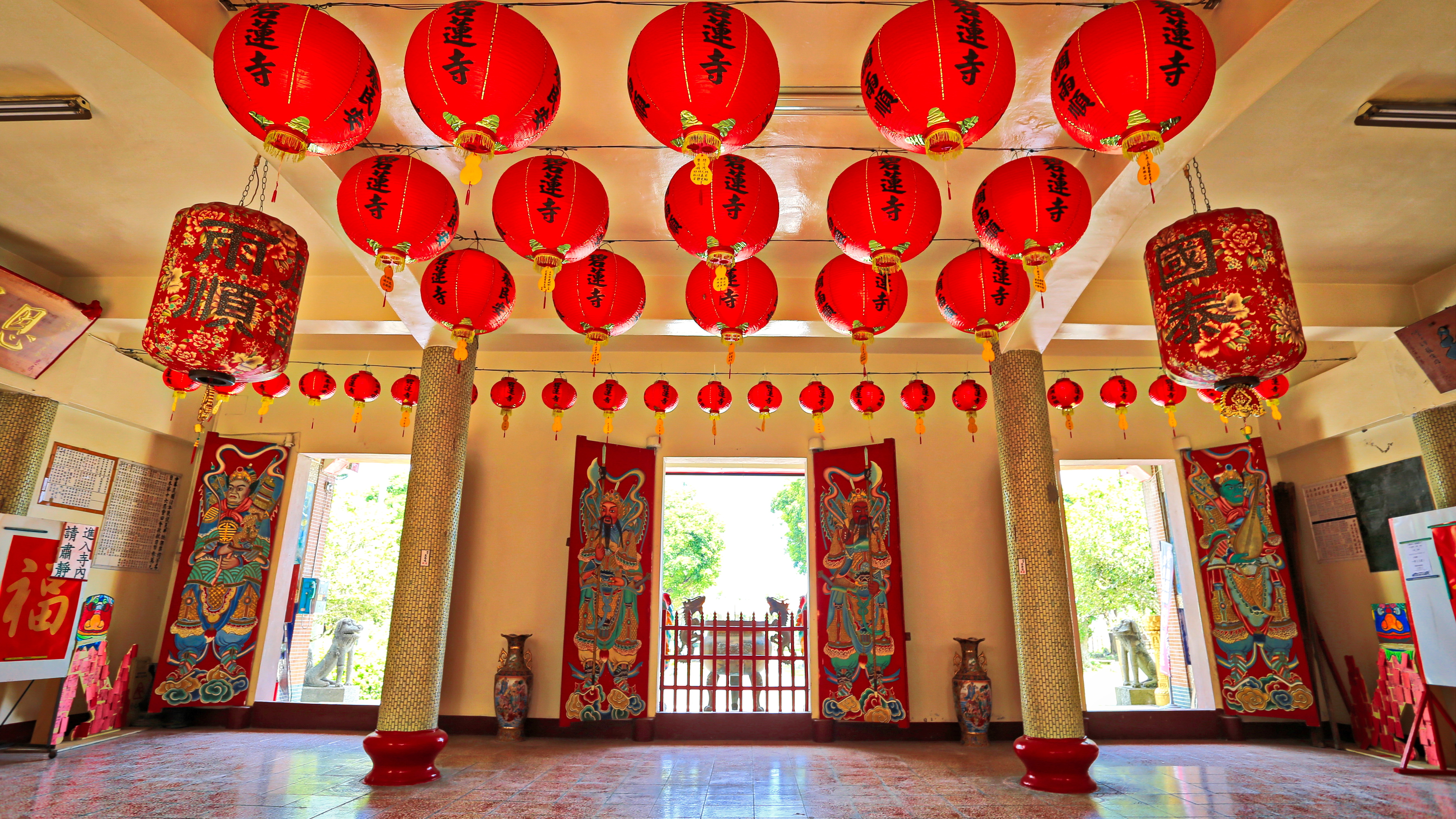 位於台灣花蓮縣壽豐鄉的碧蓮寺。碧蓮寺的前身是豐田神社。